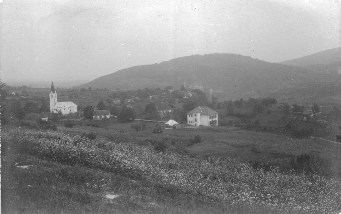 Naselje Adlešiči